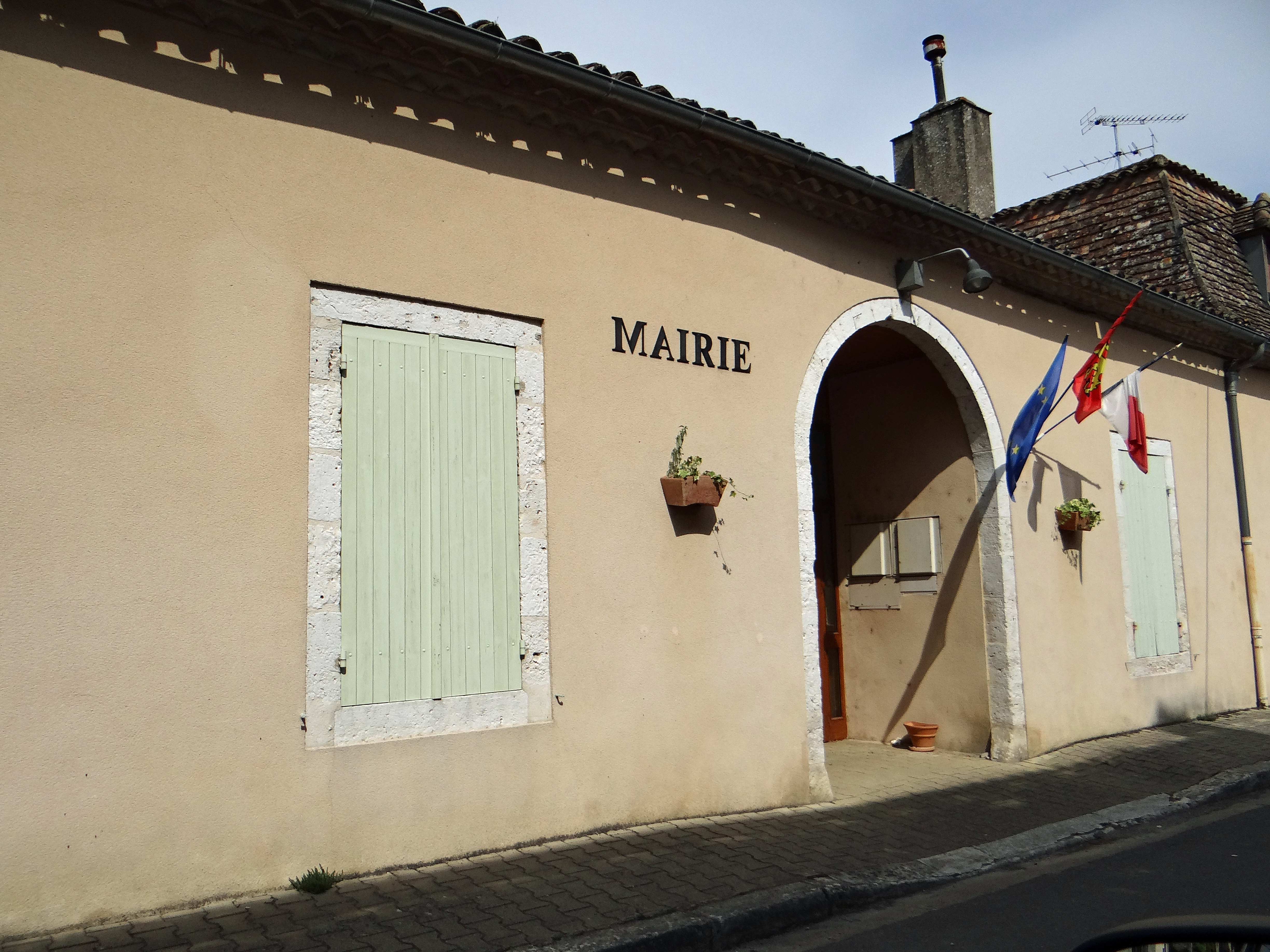 Cahuzac (Lot-et-Garonne) - Mairie